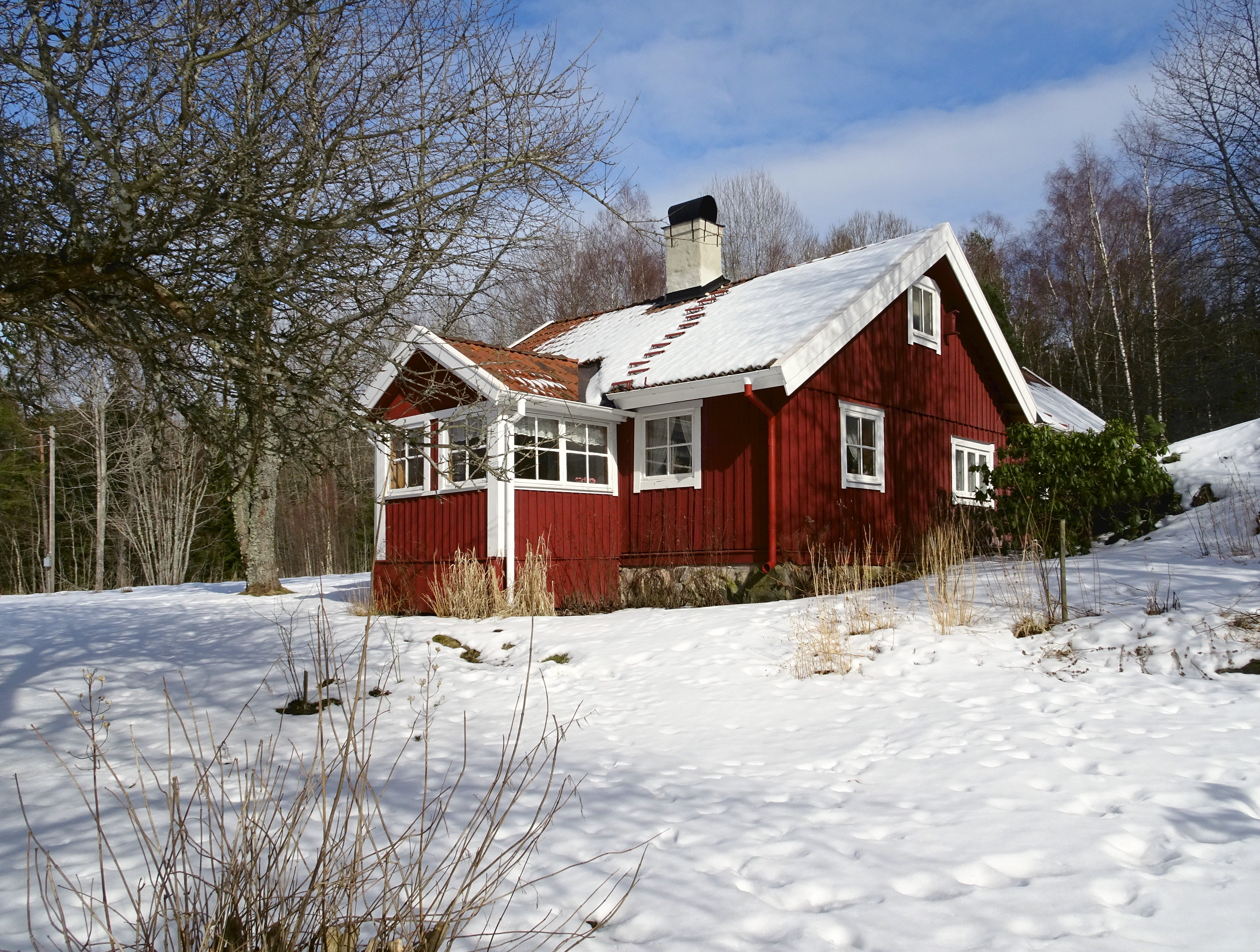 Moa Martinsons torp "Johannesdal" i Sorunda socken